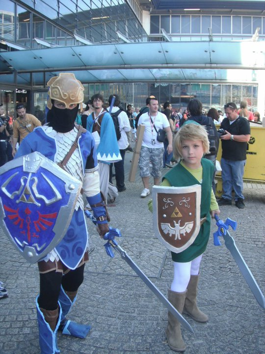 Cosplay de Link de The Legend of Zelda à la Japan Expo 2011